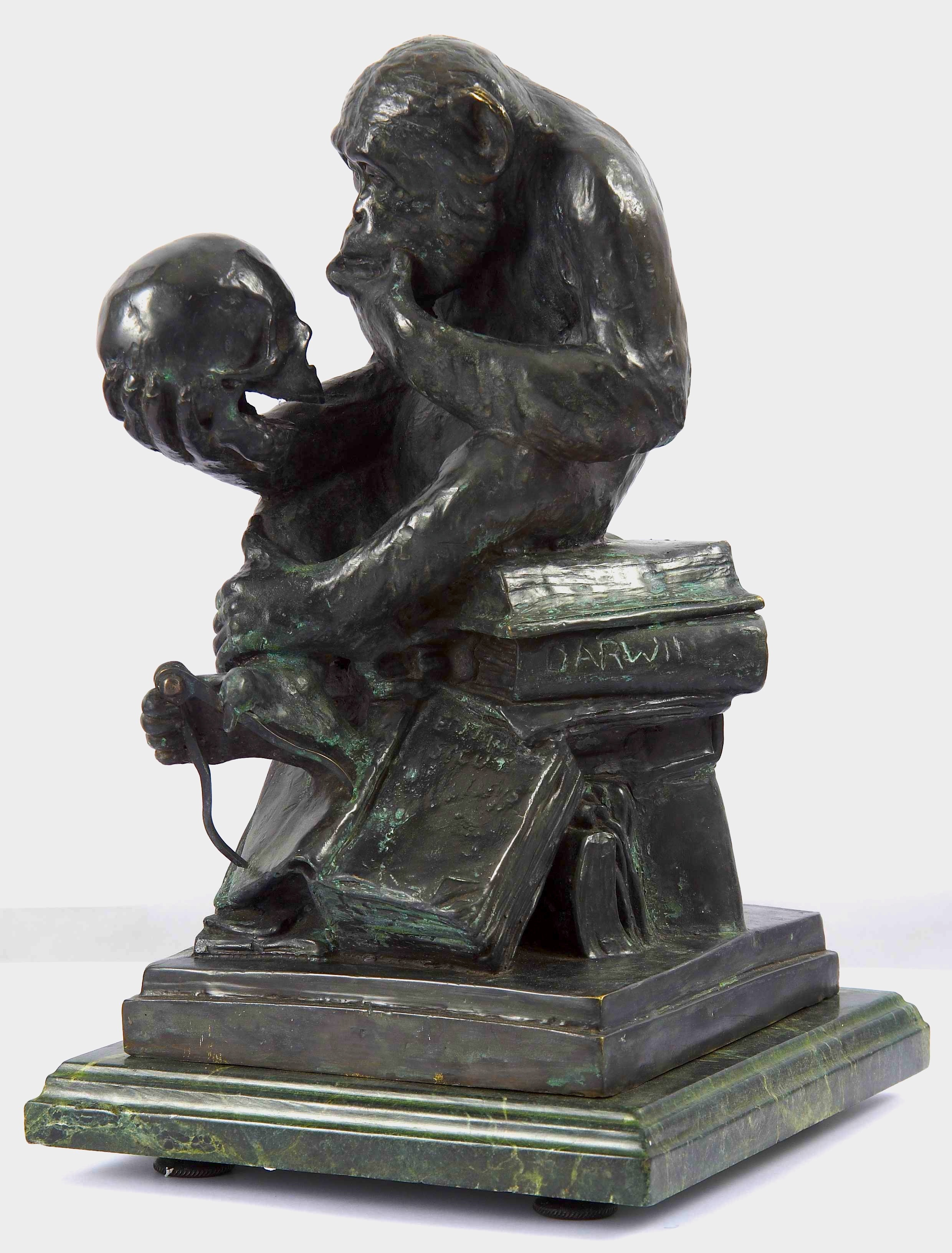 Hugo Rheinhold's Affe mit Schädel (by Darwin Monkey)